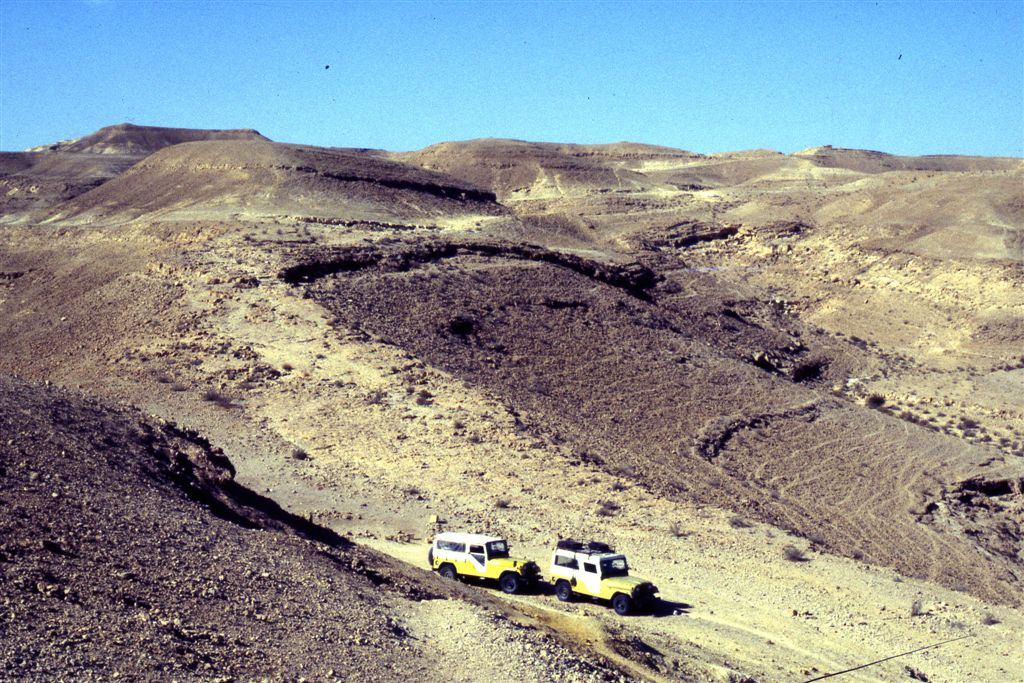 רכבי סקר ישראל במעלה העקרבים בנגב